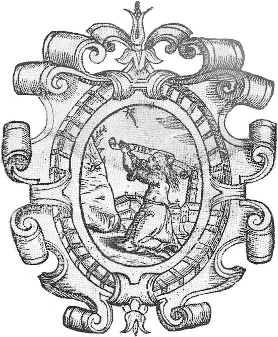 Stemma della Valpolicella sul frontespizio della prima edizione a stampa dei Privilegia et Jura